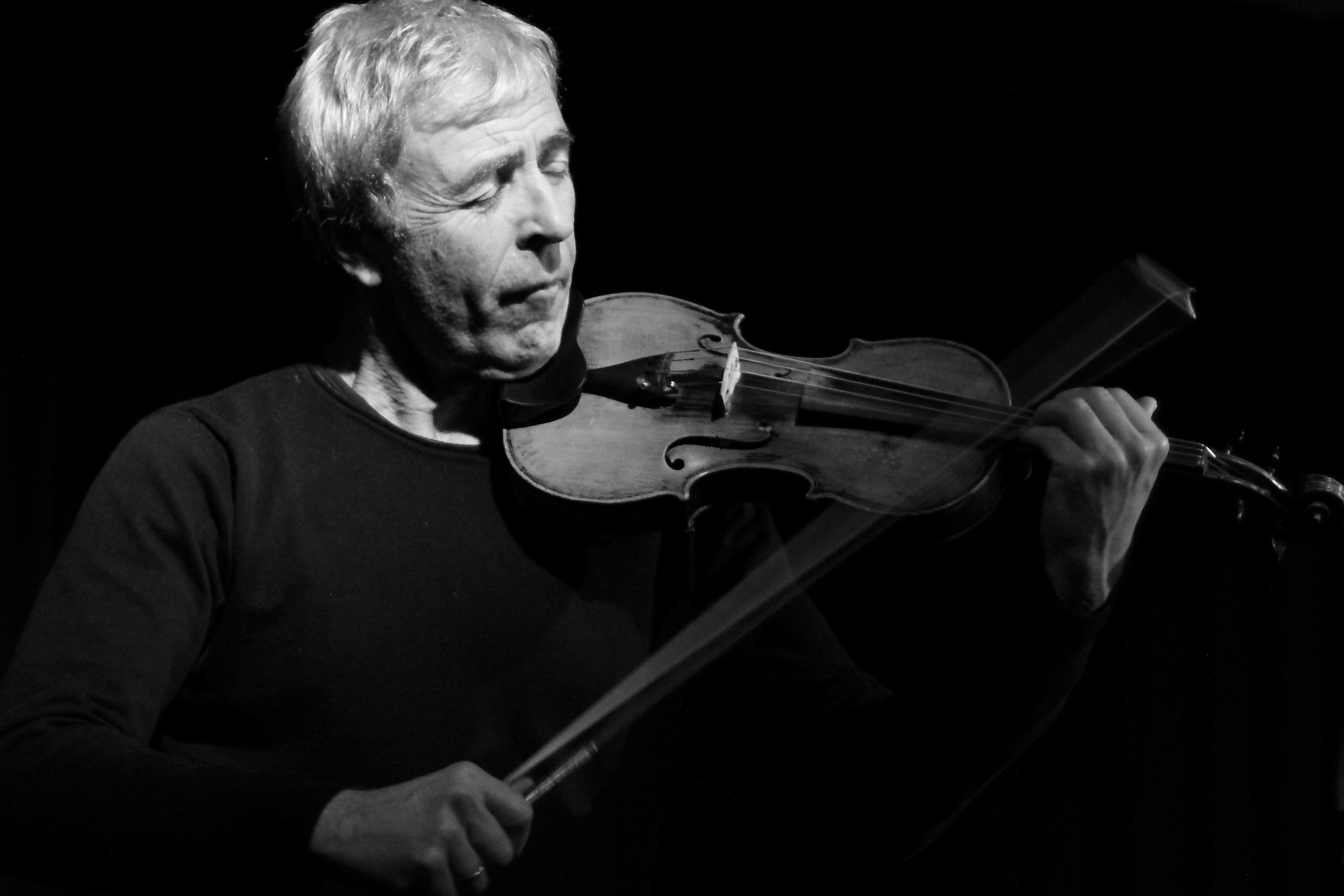 Der Violinist und Komponist Harald Kimmig im Club W71 in Weikersheim.